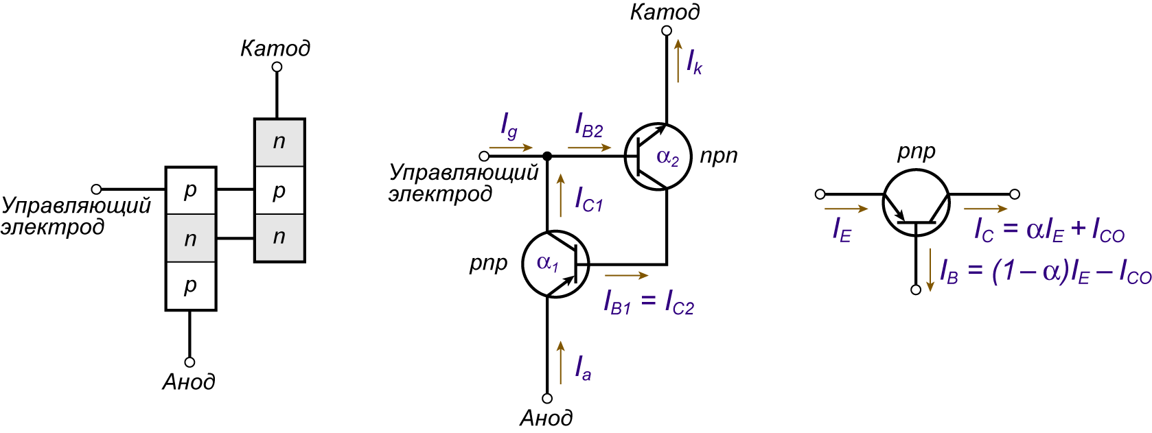 Двухтранзисторная модель тиристора